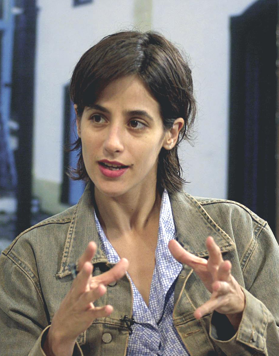 A atriz brasileira Mariana Lima.